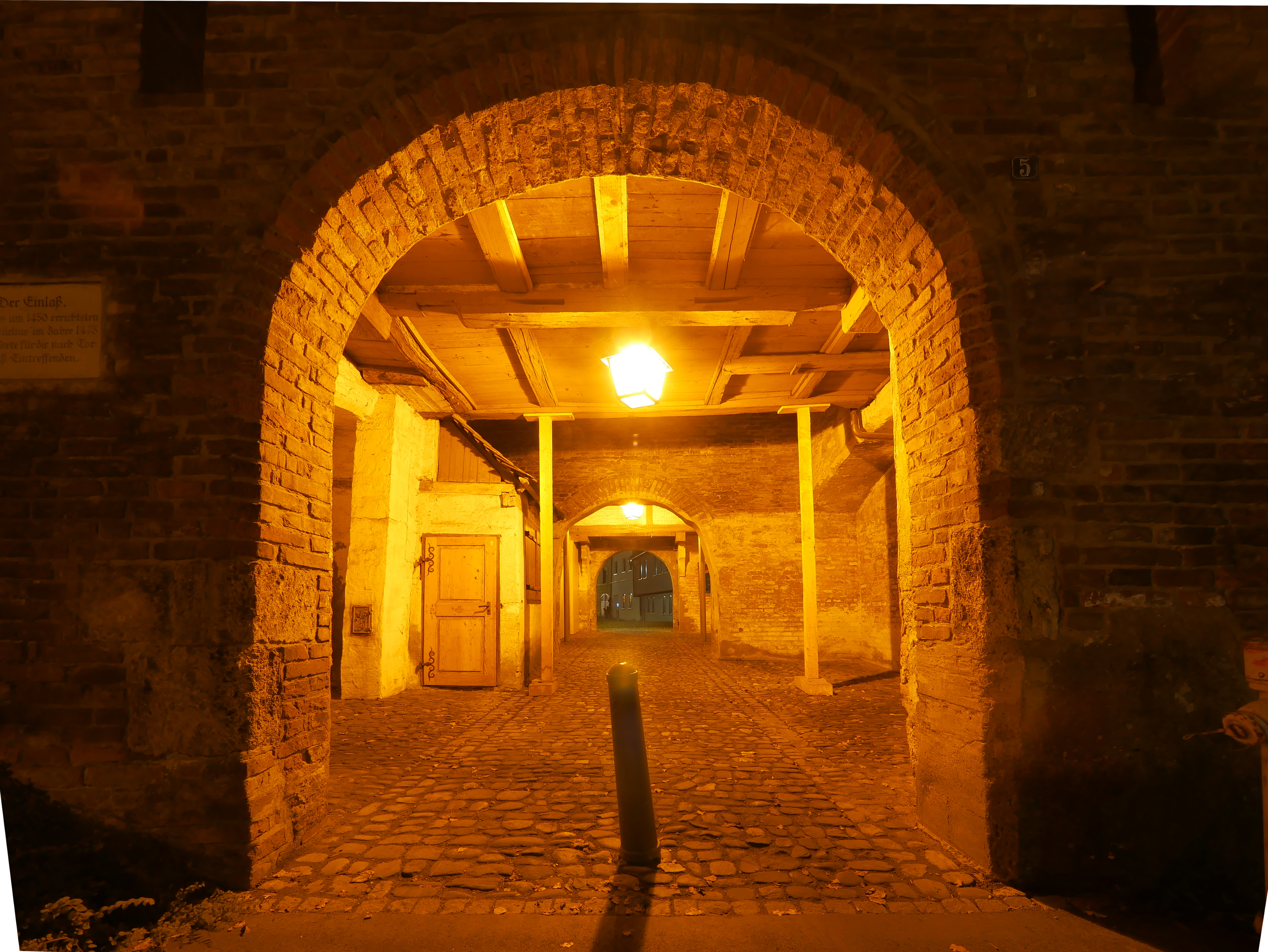 Das Stadttor "Einlaß" der Oberschwäbischen Stadt Memmingen. Durch dieses Tor wurde Personen nach peinlicher Kontrolle hereingelassen, die erst nach dem Schließen der Stadttore die Stadt erreichten. Blick von ausserhalb der Mauern auf das Tor. Das Bild zeigt das "Innere" des Stadttors.